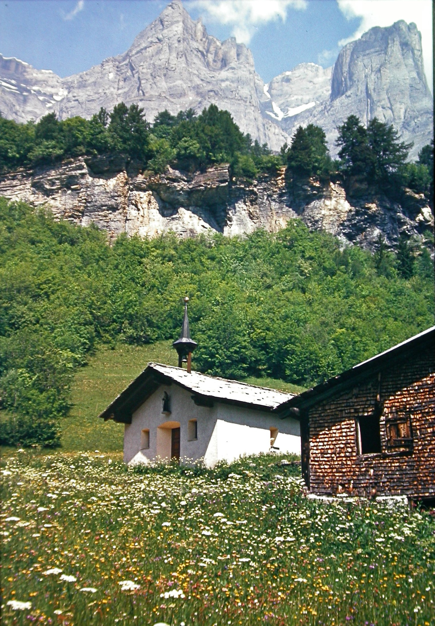 Birchen Kapelle mit Leeshörnern